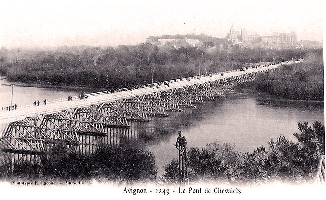 Pont de chevalets unissant Avignon à Villeneuve-lès-Avignon